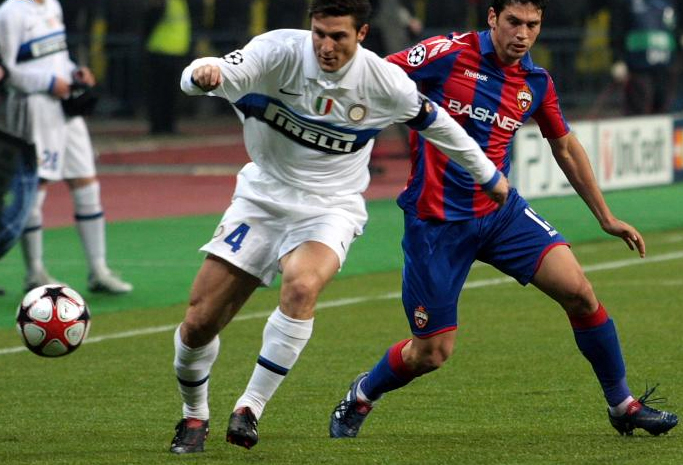 Zanetti durante una partita col CSKA Mosca (6.4.2010)